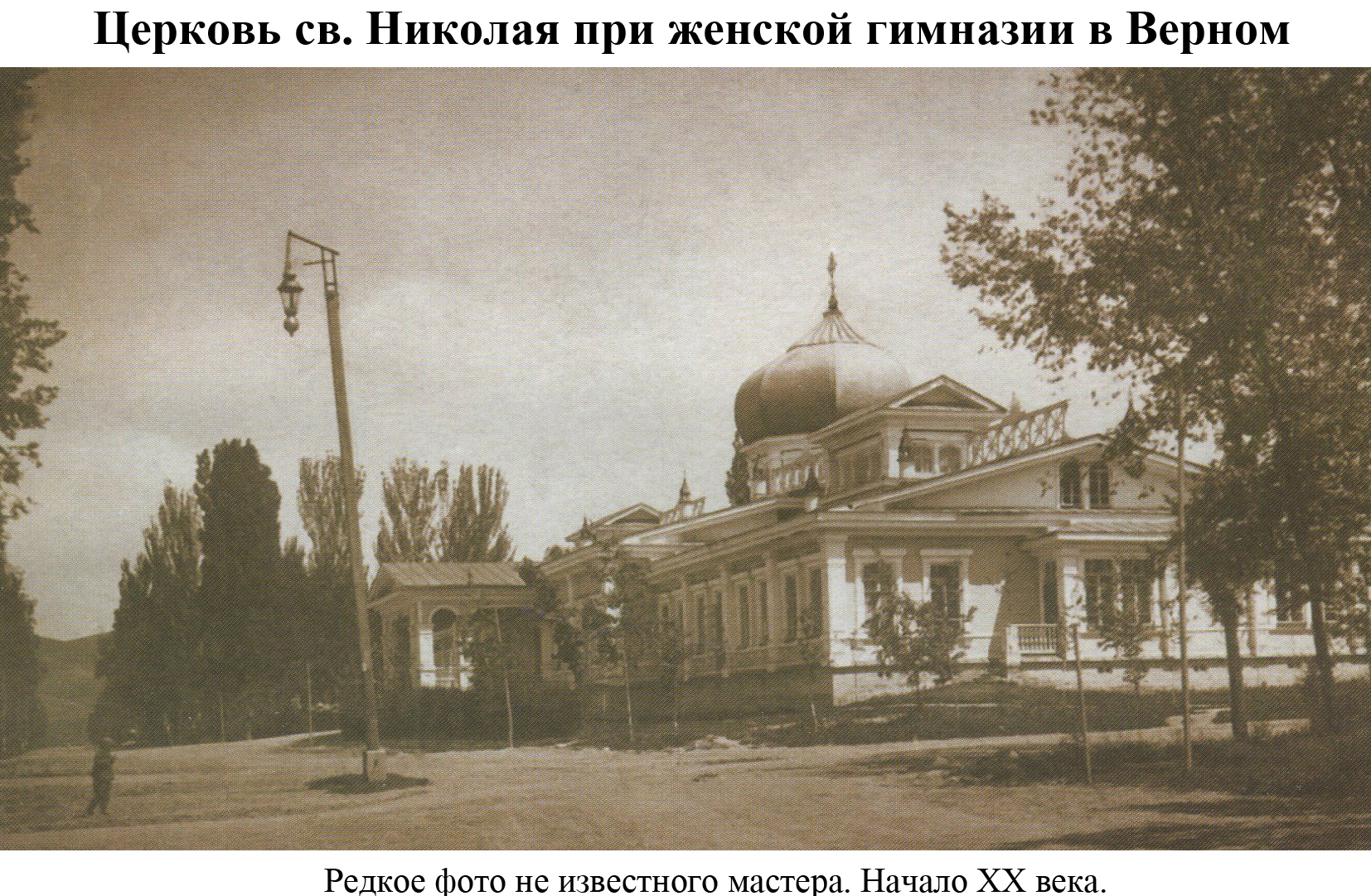 Church of St. Nicholas at female grammar school in Verne (now Almaty). Rare photo not known master. Beginning of the XX century.